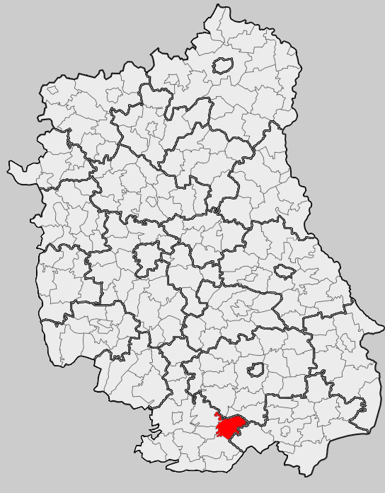 Map of gmina Józefów, Biłgoraj county, Lublin voivodship Mapa gminy Józefów, powiat biłgorajski, województwo lubelskie